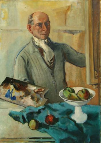 Zelfportret aan de ezel. Joods Historisch Museum, Amsterdam